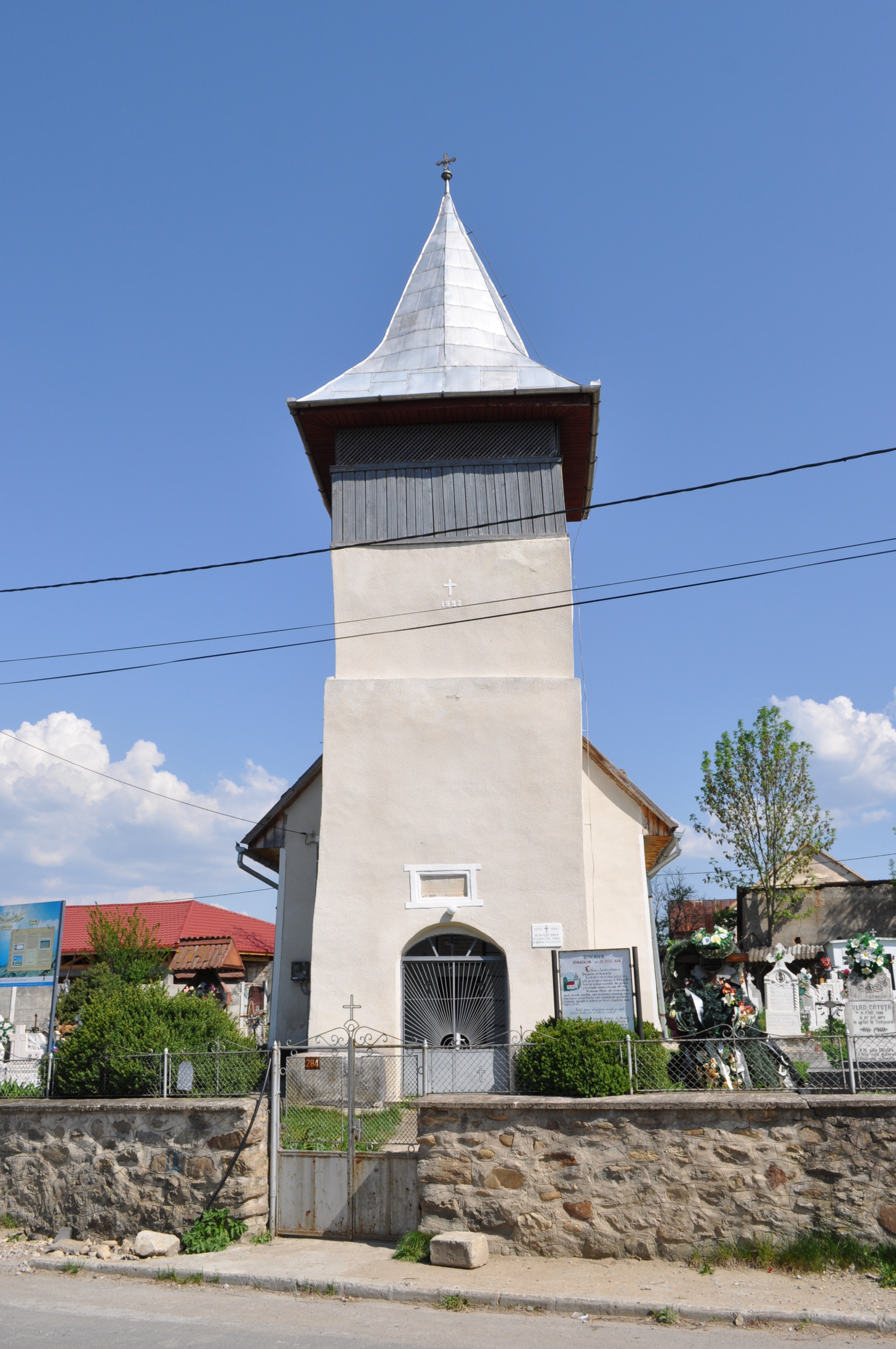 Biserica "Sf. Apostoli Petru și Pavel", sat SĂLAŞU DE SUS; comuna SĂLAŞU DE SUS